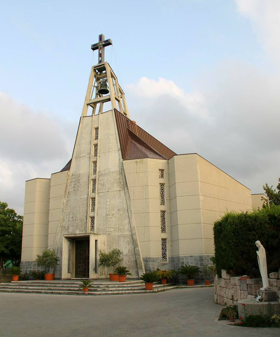 Chiesa Nostra Signora di Lourdes This is a photo of a monument which is part of cultural heritage of Italy.